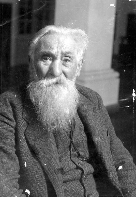 Bolesław Limanowski